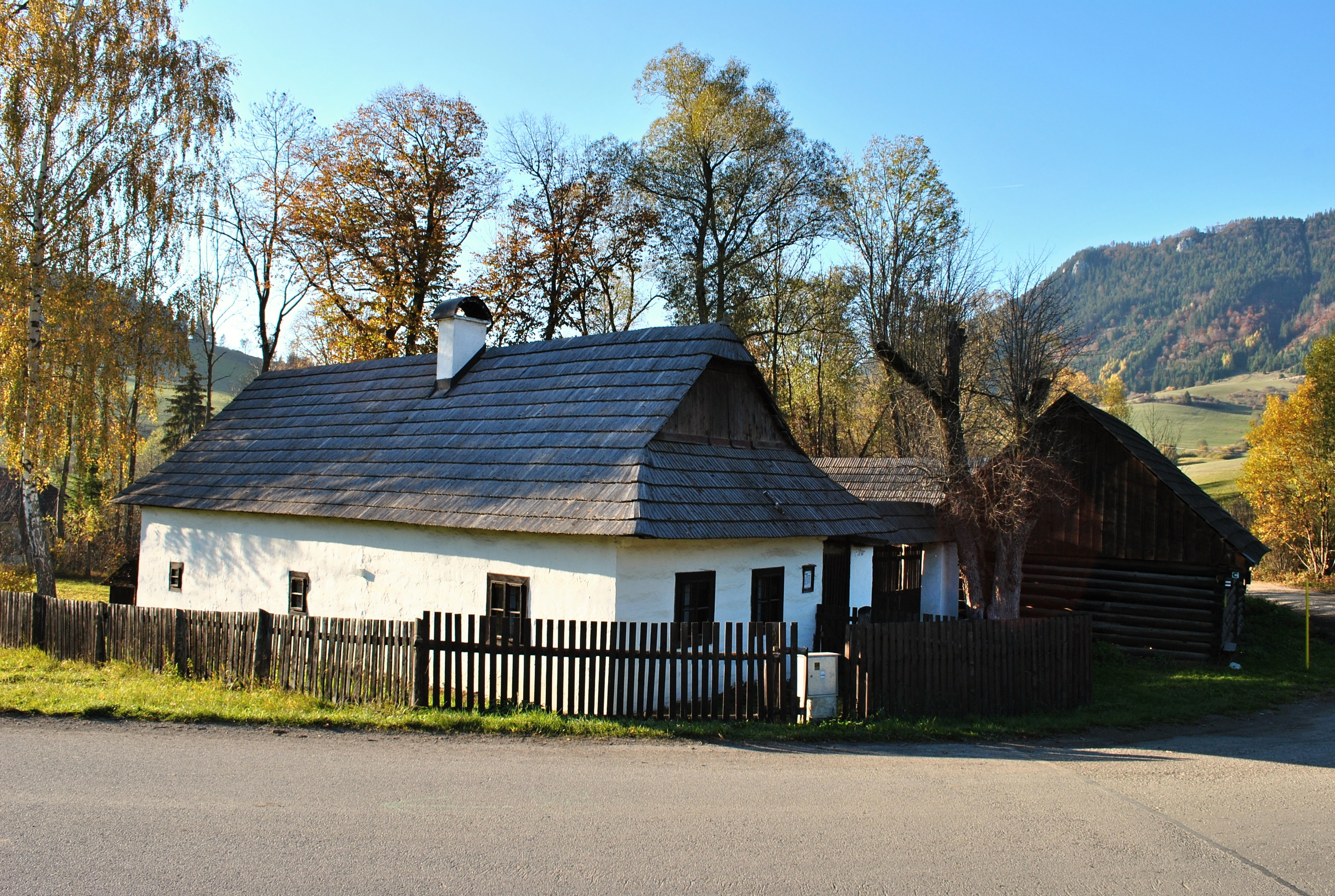 Bukovina, okr. Liptovský Mikuláš - hospodárska usadlosť z polovice 19. storočia